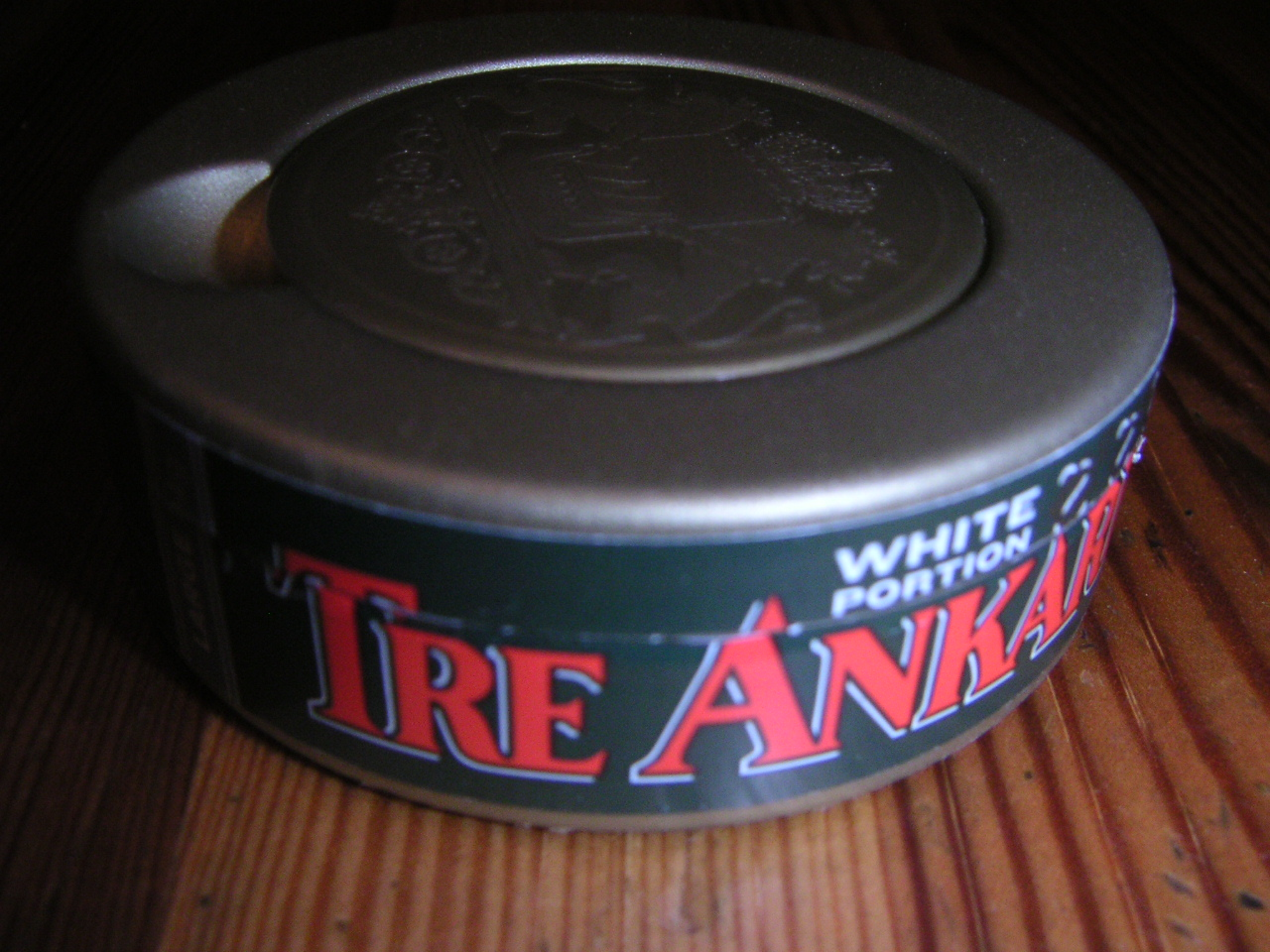 Tre Ankare snus